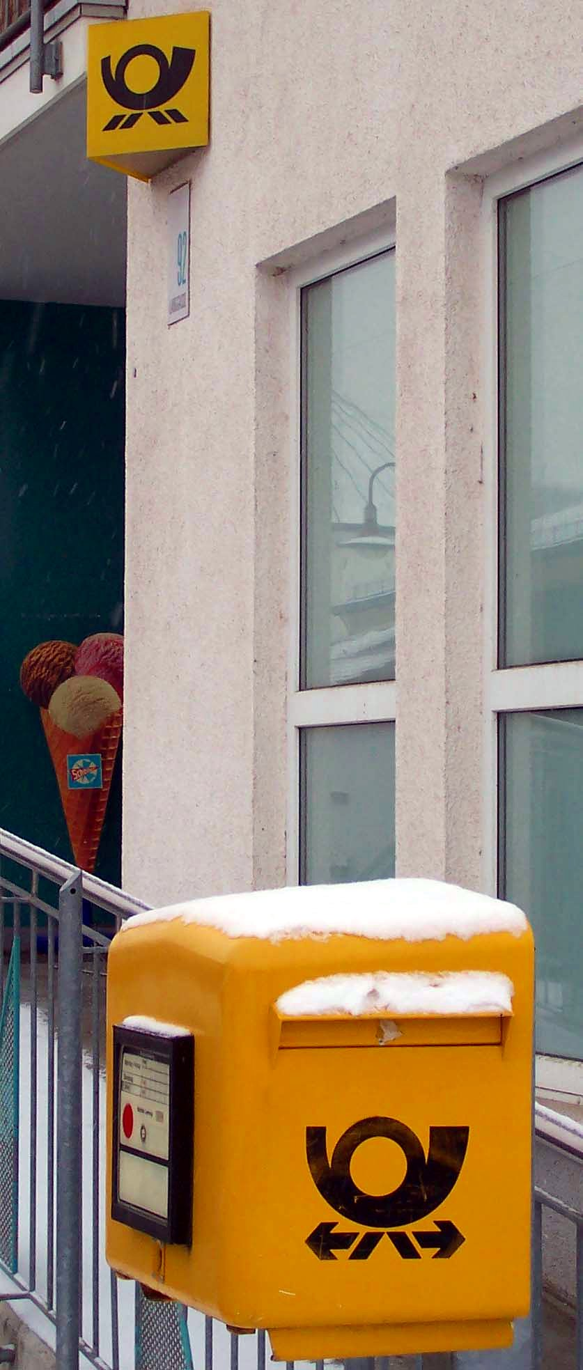 deutsche Posthörner Vordergrund: Post-Briefkasten mit deutschem Posthorn der Deutschen Bundespost, zu erkennen an den beiden Pfeilen (eigentlich stilisierte Blitze für den ehemaligen Telekommunikationsbereich) Hintergrund: Posthorn der Deutschen Post AG Aufnahmeort: Albig, Deutschland Aufnahmedatum: 27. Dezember 2005 Fotograf: User:Kandschwar